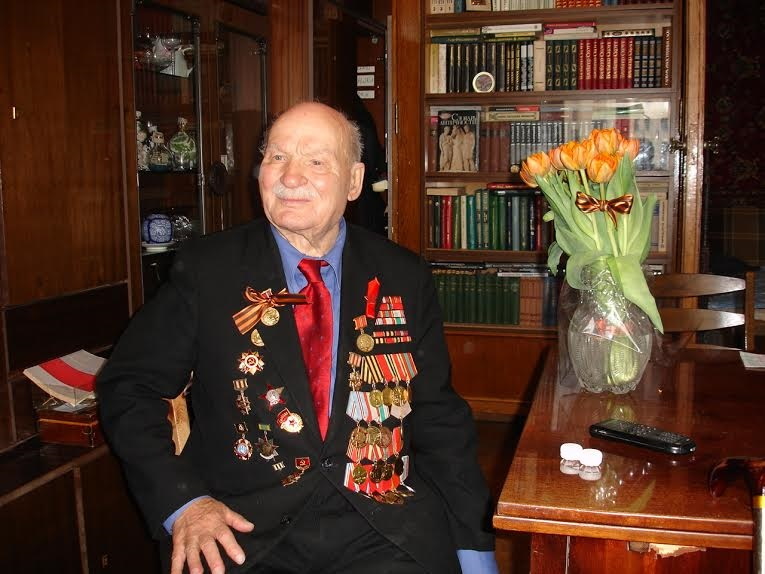 Профессор МГУ В.И. Злобин в своем кабинете, 2006 год